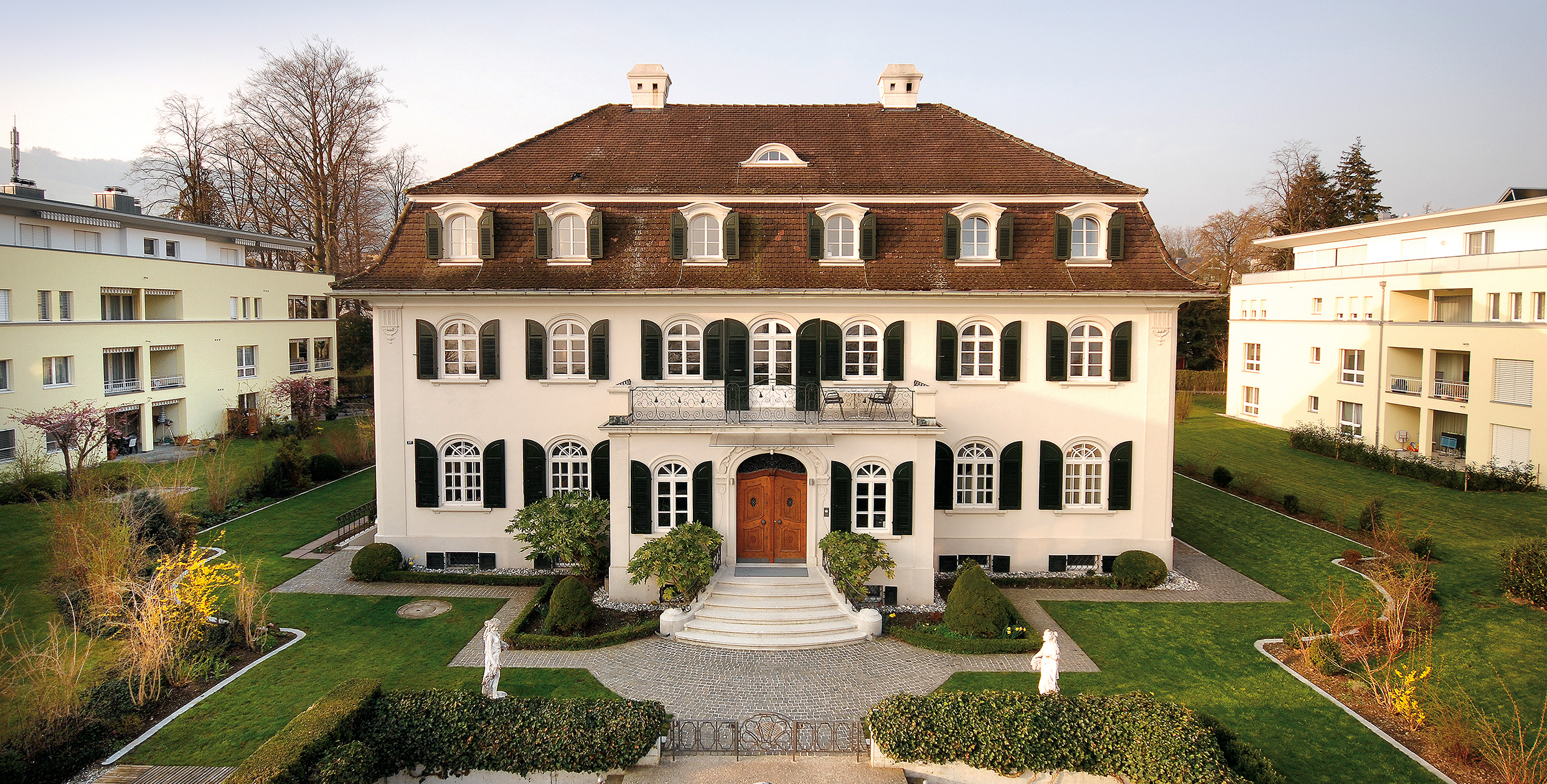 Ein Foto der von Adolf Gaudy für Franz Zürn erbauten Villa Lindenhof in Rorschach. Heute Hauptsitz der Firmengruppe EnDes Engineering und Design.